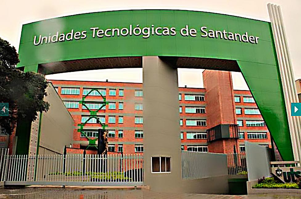 PÓRTICO UTS ENTRADA PRINCIPAL